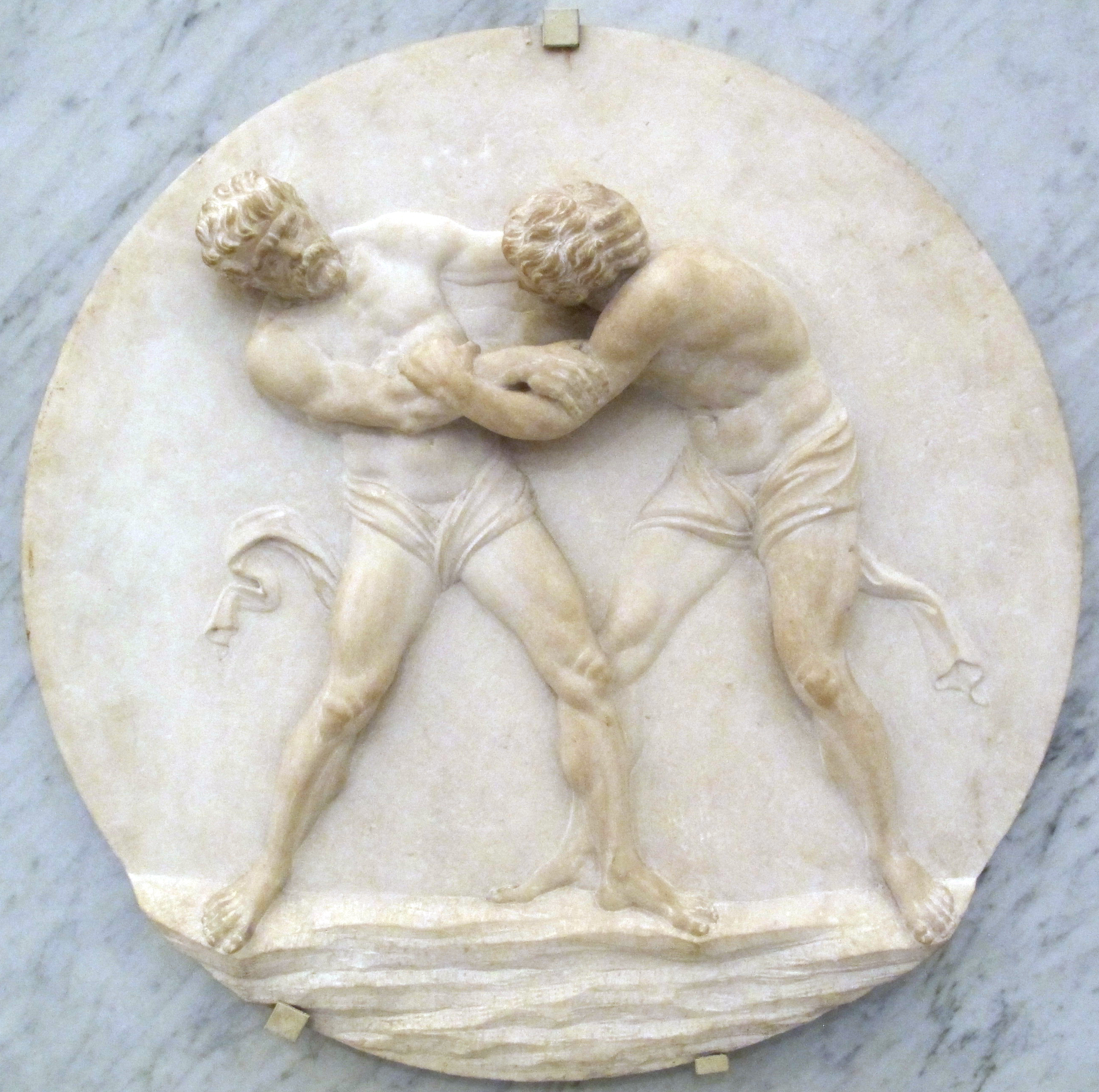 scultura italiana al Louvre